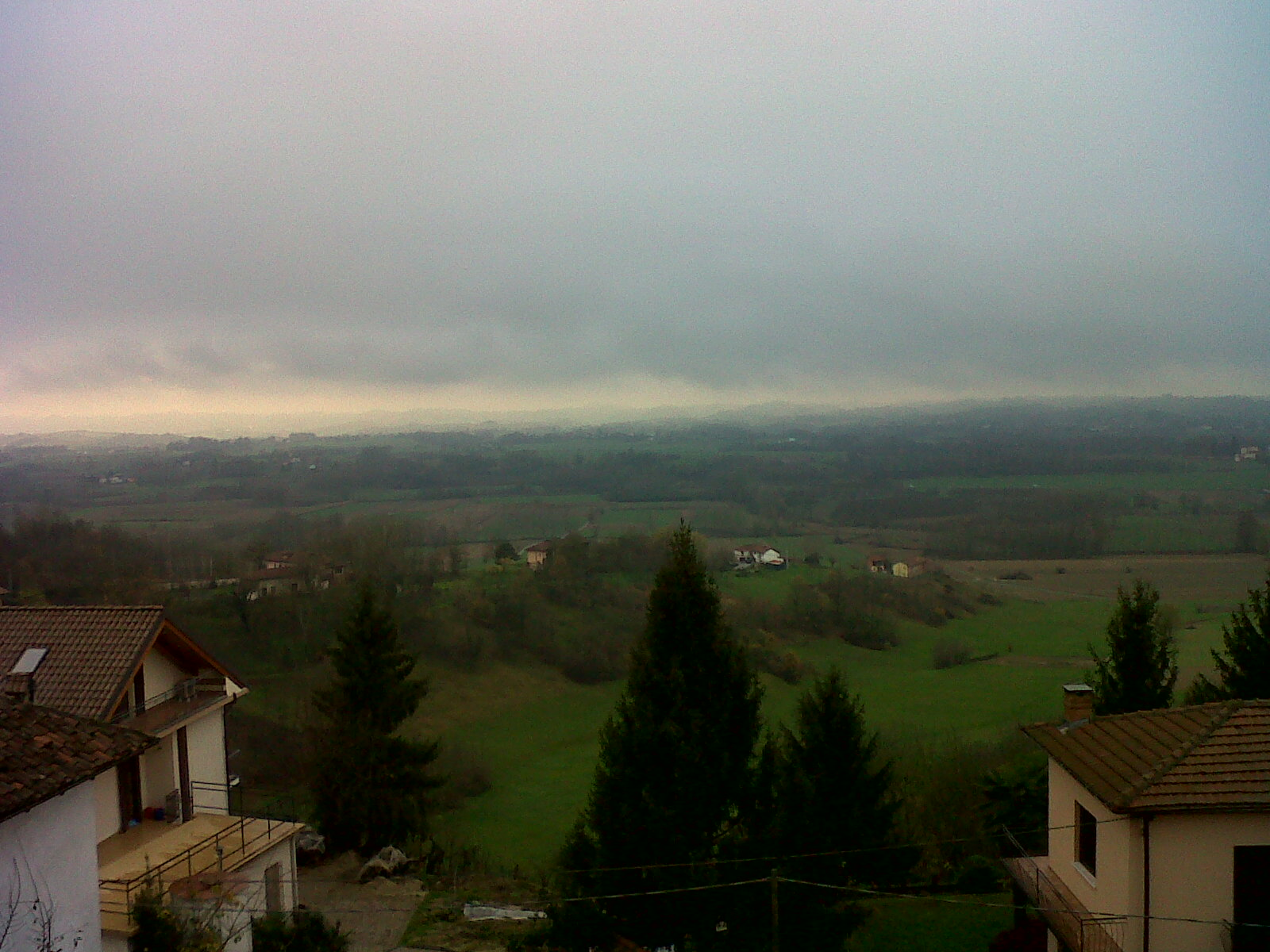 Panorama autunnale a Celle Enomondo (AT), Italia.